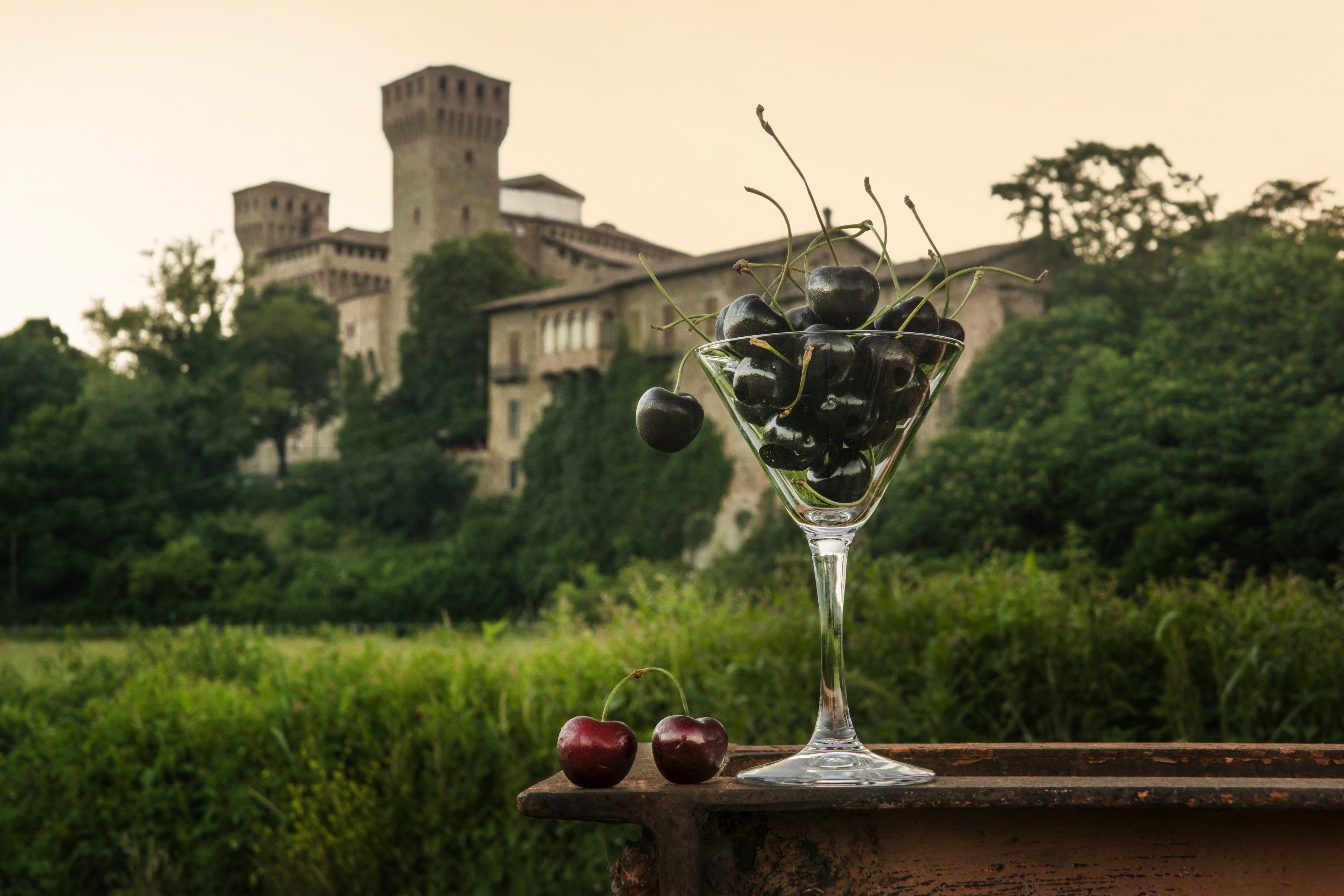 Rocca di Vignola This is a photo of a monument which is part of cultural heritage of Italy.